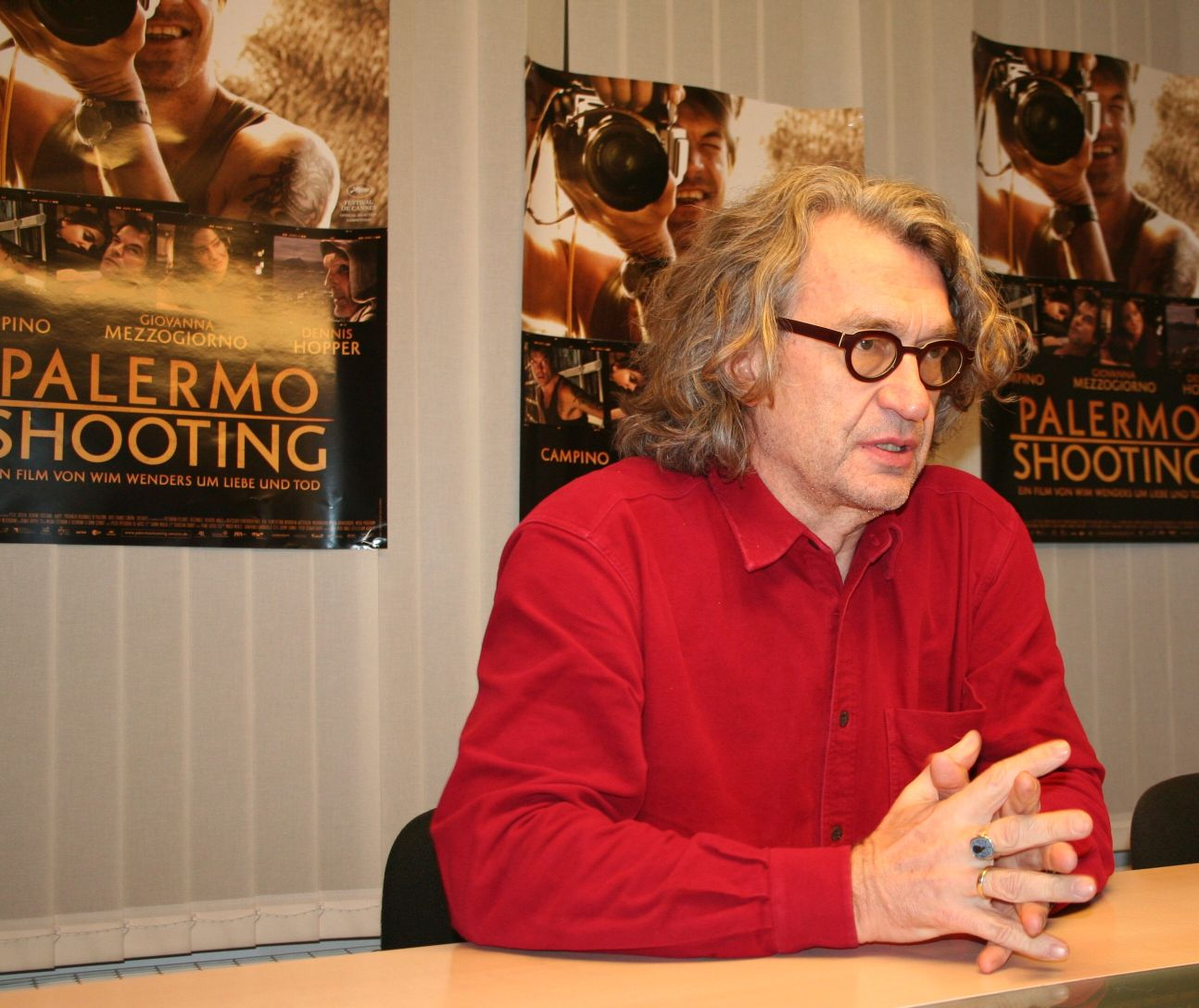 Regisseur Wim Wenders bei der Vorstellung seines Spielfilms "Palermo Shooting" im Mannheimer Cineplex